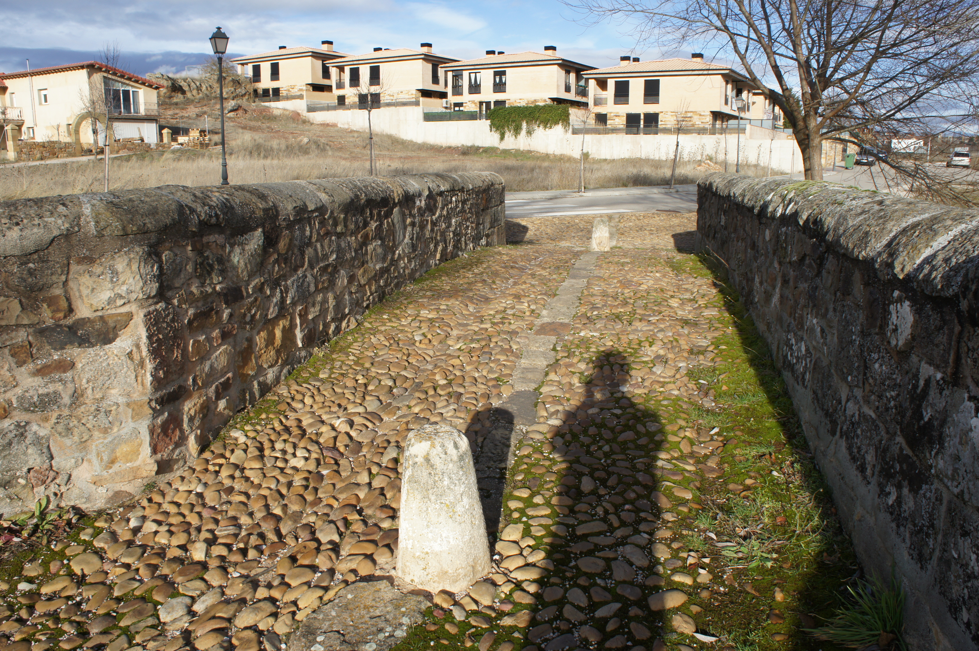 Puentecillo de origen romano sobre el río Golmayo en el pueblo homónimo de la provincia de Soria.